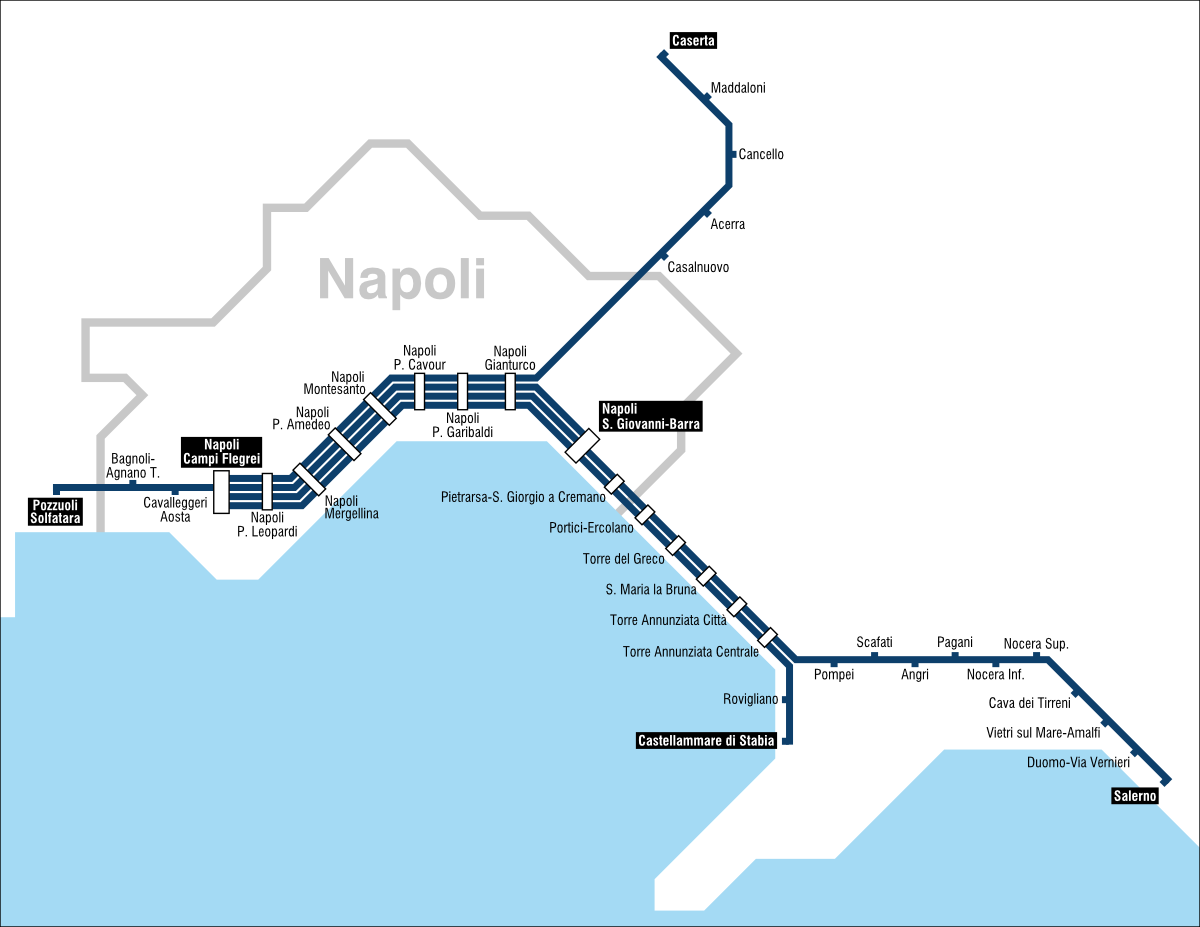 Mappa del servizio ferroviario metropolitano di Napoli, esercito da Trenitalia; la tratta urbana (Pozzuoli Solfatara–Napoli Gianturco) è indicata come "linea 2" nel sistema della metropolitana cittadina.